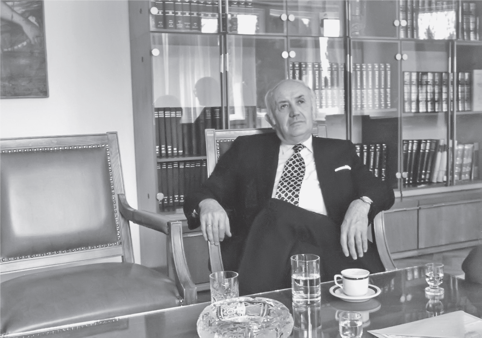 Srpskohrvatski / српскохрватски: Miomir Dašić 1998.godine